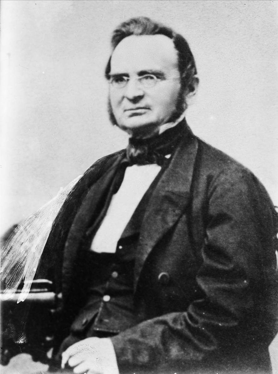 Adolf Bredo Stabell (født 19. november 1807 i Trondheim, død 21. november 1865 i Christiania) var en norsk journalist, redaktør, bankmann og politiker innenfor bondeopposisjonen.